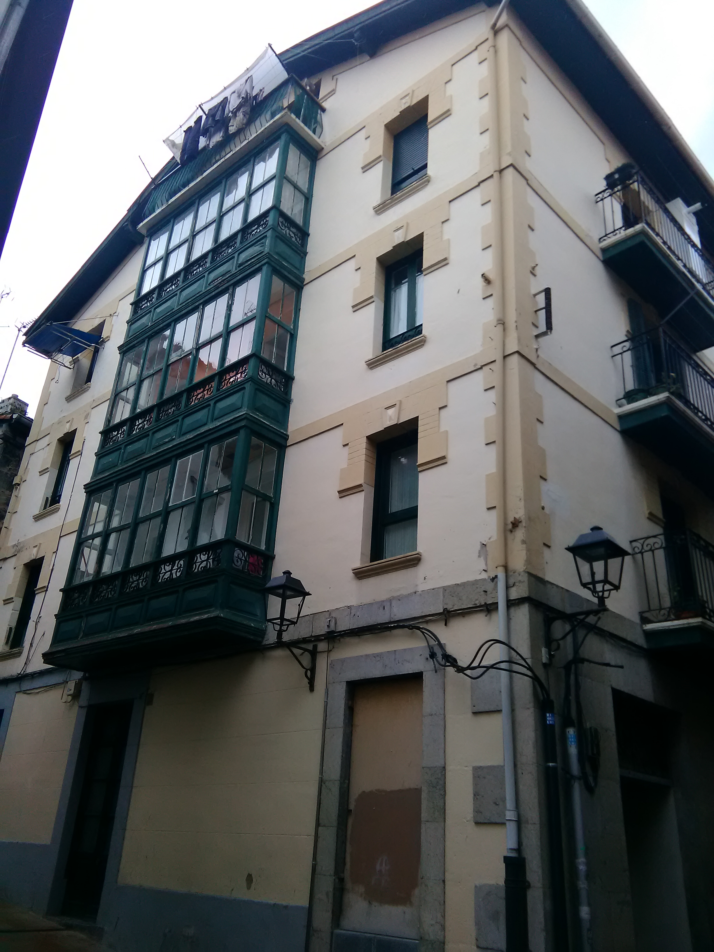 Casa-tienda en el cruce Tortola - Beaskokalea (Lekeitio, España), levantada por la "americana" Flora Alzola a principios del s. XX.